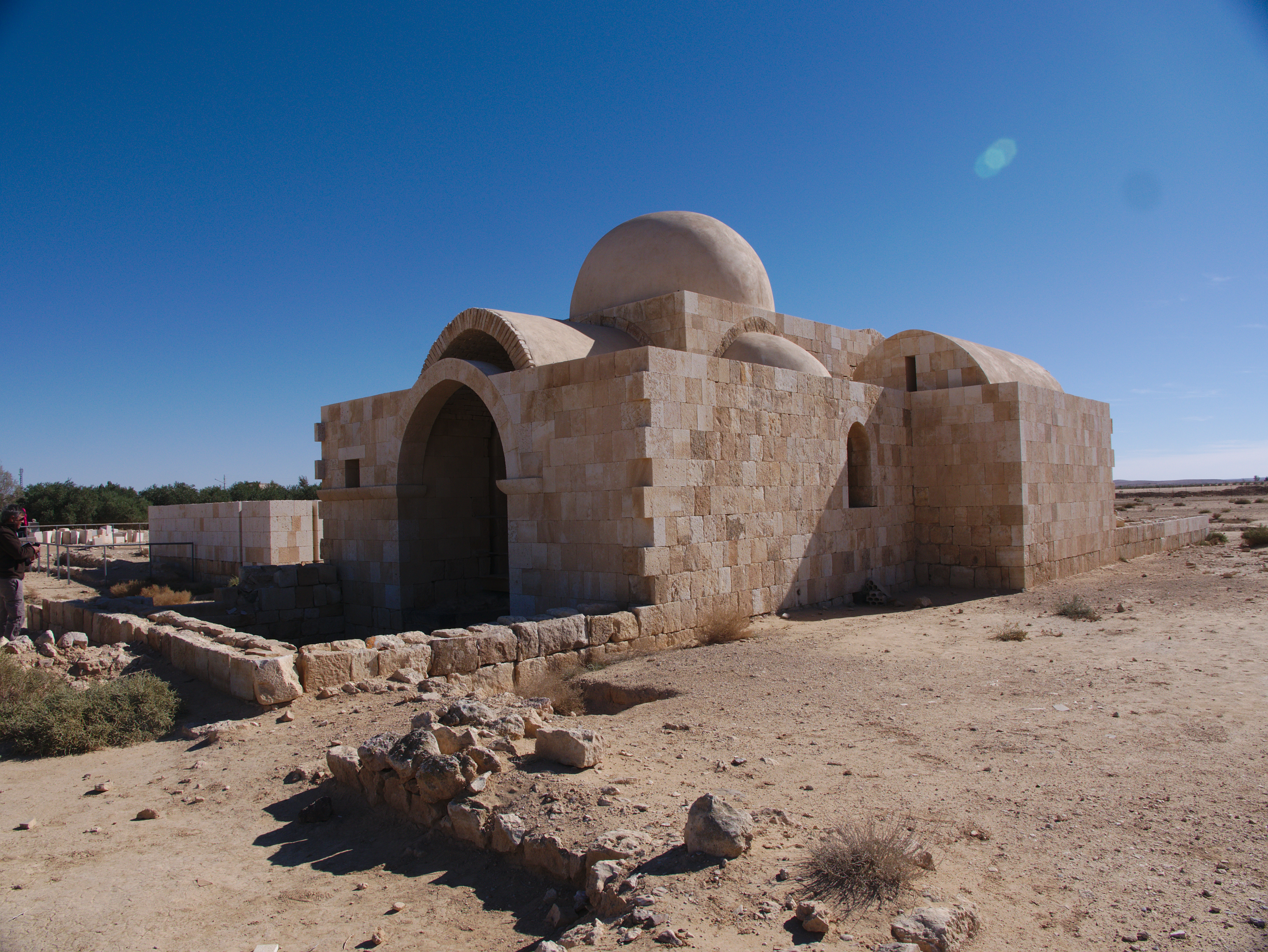 Vue générale des thermes de Qasr al Hallabat situés à Hamman as Sarah